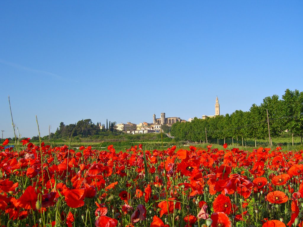 Primavera en L'Arboç